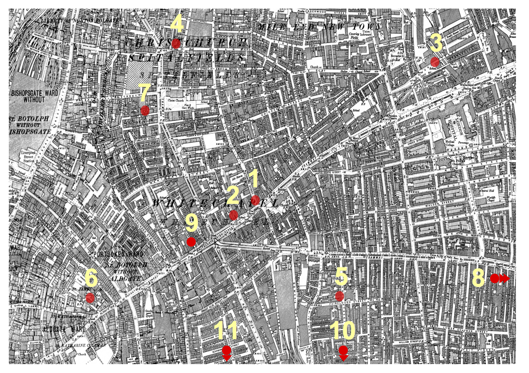 Carte des meurtres ayant eu lieu entre le 3 avril 1888 et le 13 février 1891à Whitechapel comportant 11 points rouges numérotés.